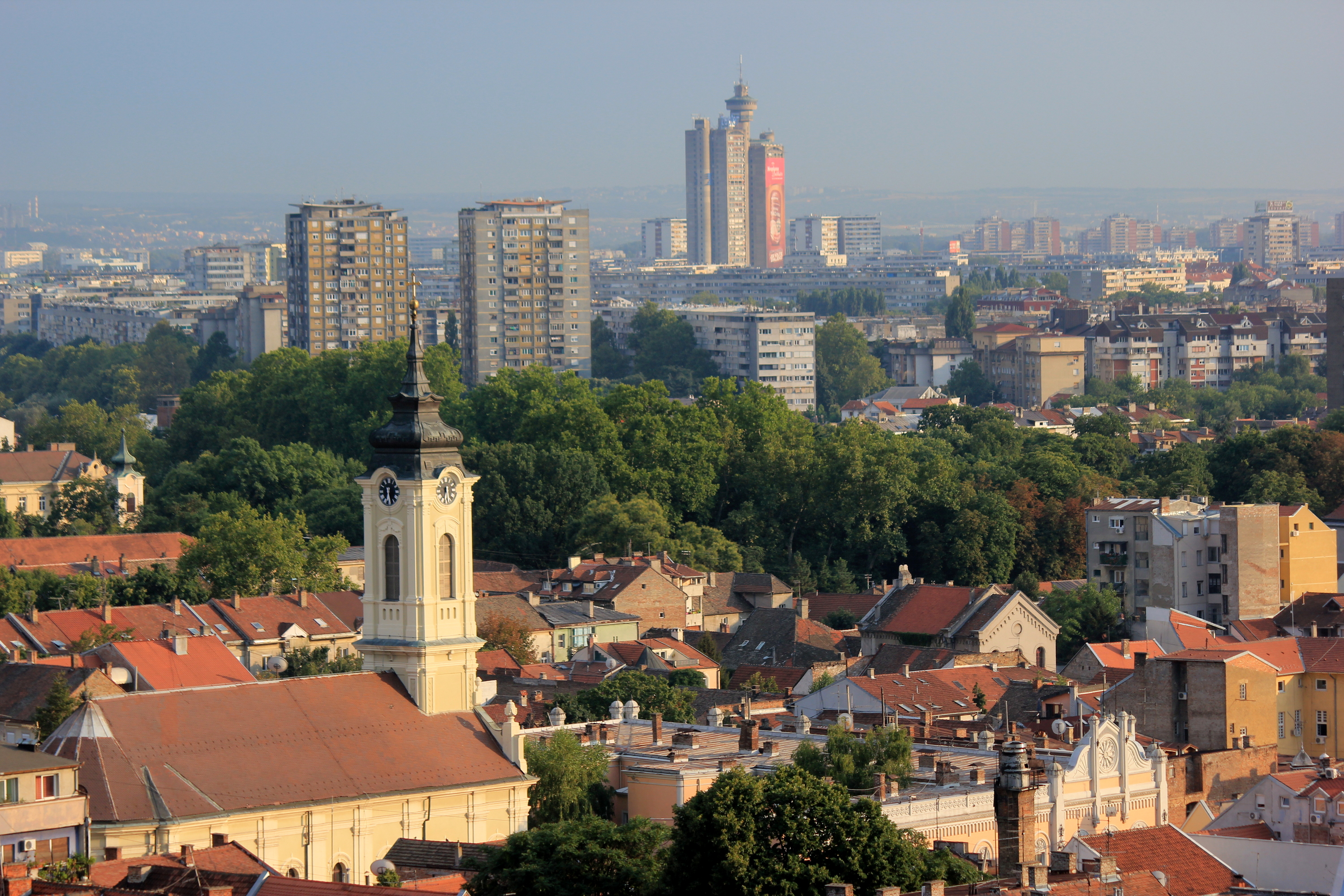 Blick über Zemun auf Novi Beograd, Serbien.